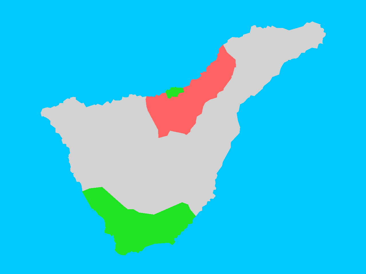 Der Schwerpunkt des Tourismus auf Teneriffa liegt in den küstennahen Bereichen der Stadtkreise Adeje, Arona, San Miguel de Abona und Granadilla de Abona im Süden sowie in Puerto de la Cruz im Norden der Insel, grün dargestellt 90 % der Guachinches befinden sich in den Stadtkreisen Tacoronte, La Matanza, La Victoria, Santa Ursula, Los Realejos und im unteren Bereich des Stadtkreises La Orotava, rot dargestellt